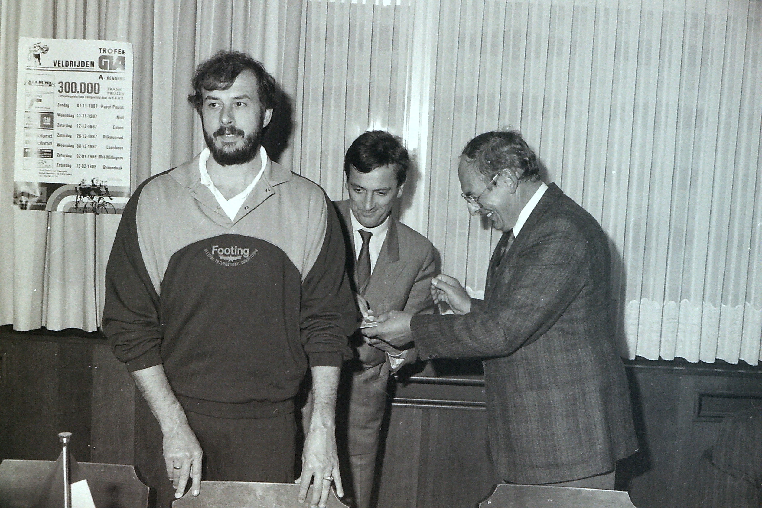 de allereerste officiële foto van de Gazet van Antwerpen Veldrijden Trofee. Oprichter Jef Cleemput liet zich bij de oprichting bijstaan door het advies van Bert Vermeire